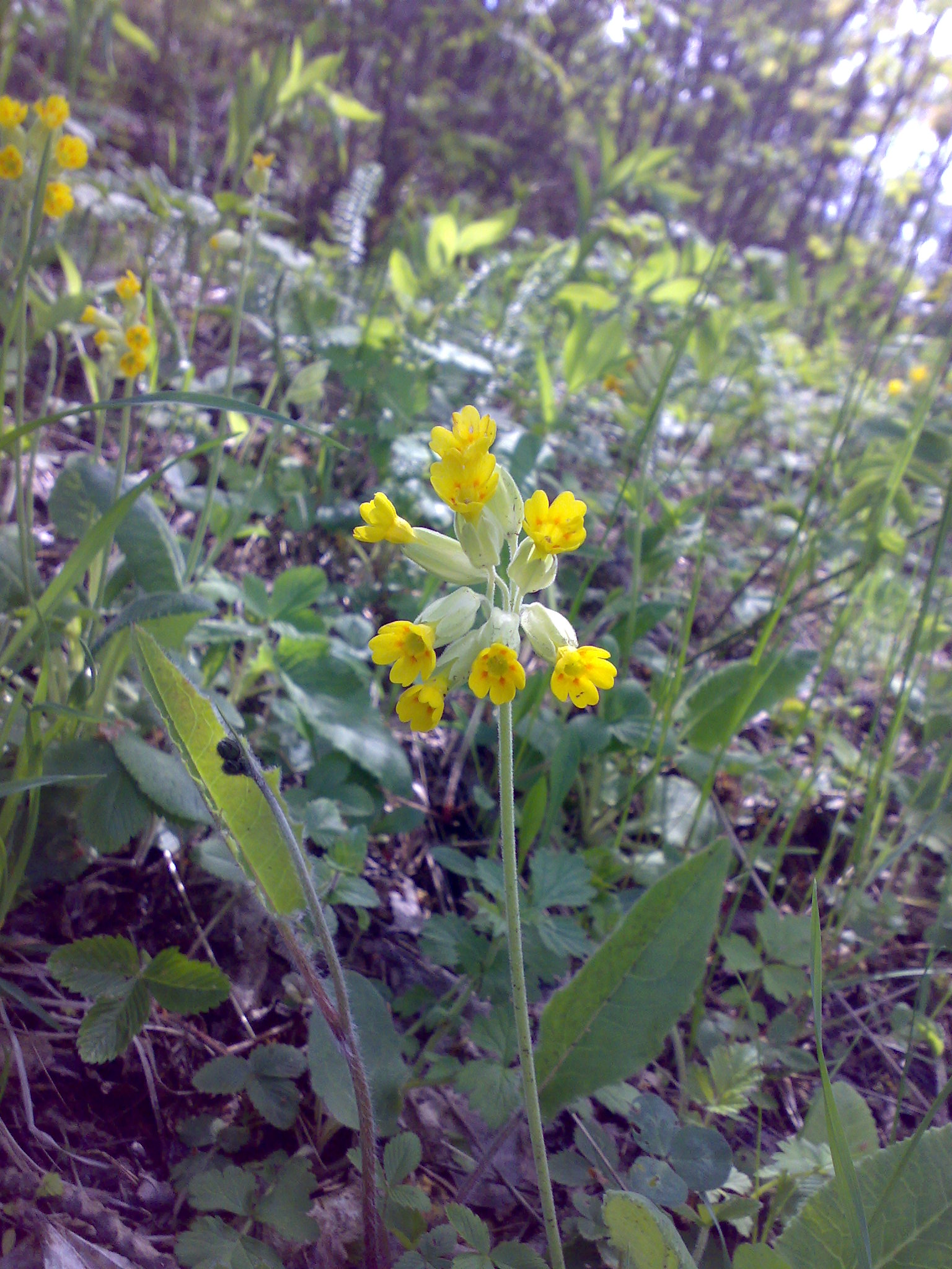 Primula veris, Marianökkelblom, marianøkkelblom, Norway